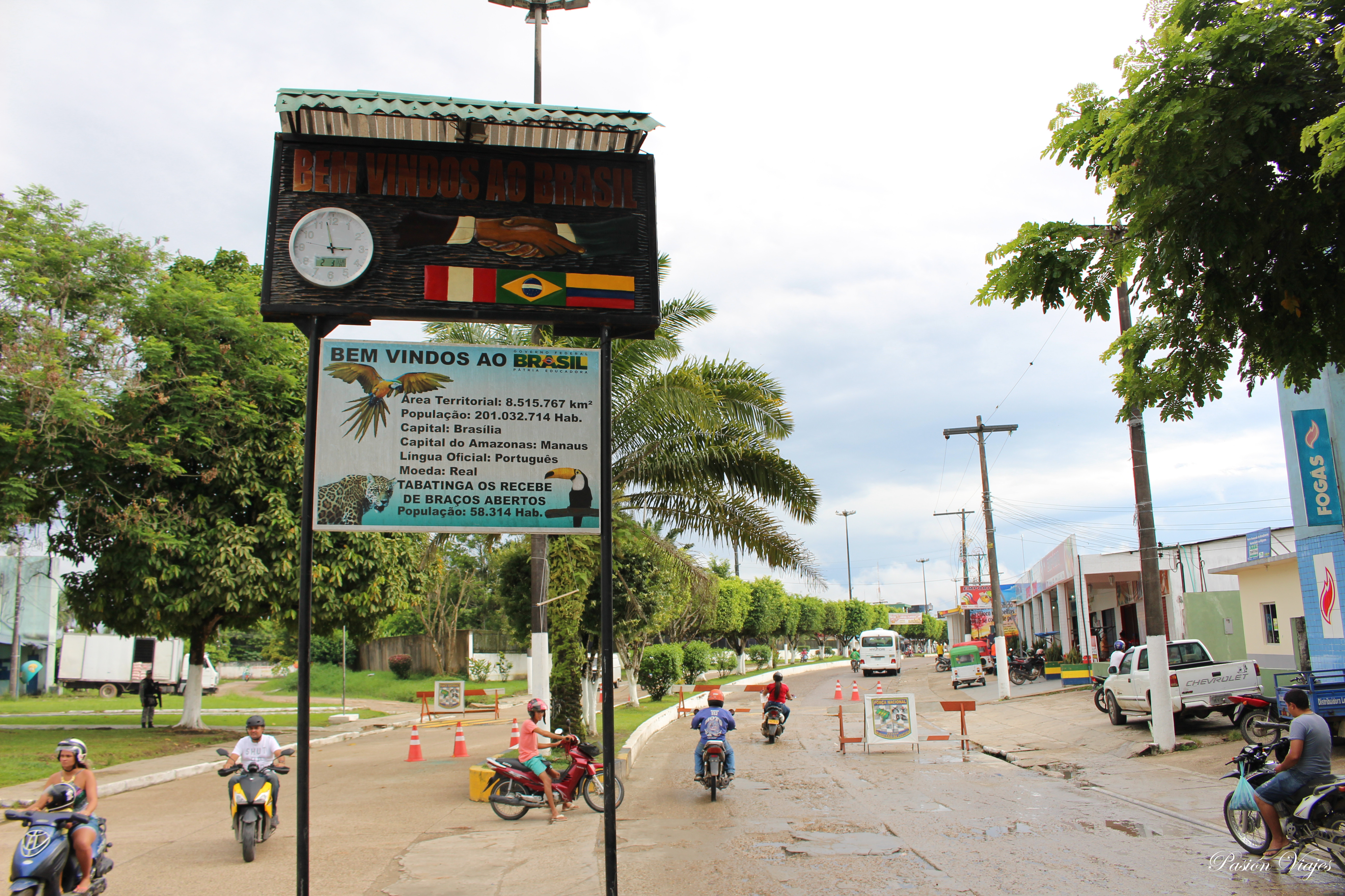 Entrada da cidade de Tabatinga - Amazonas.